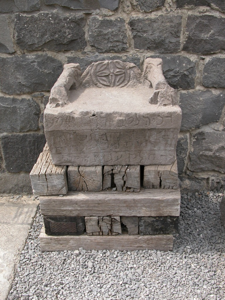 Old Synagogue in Korazim, Israel.